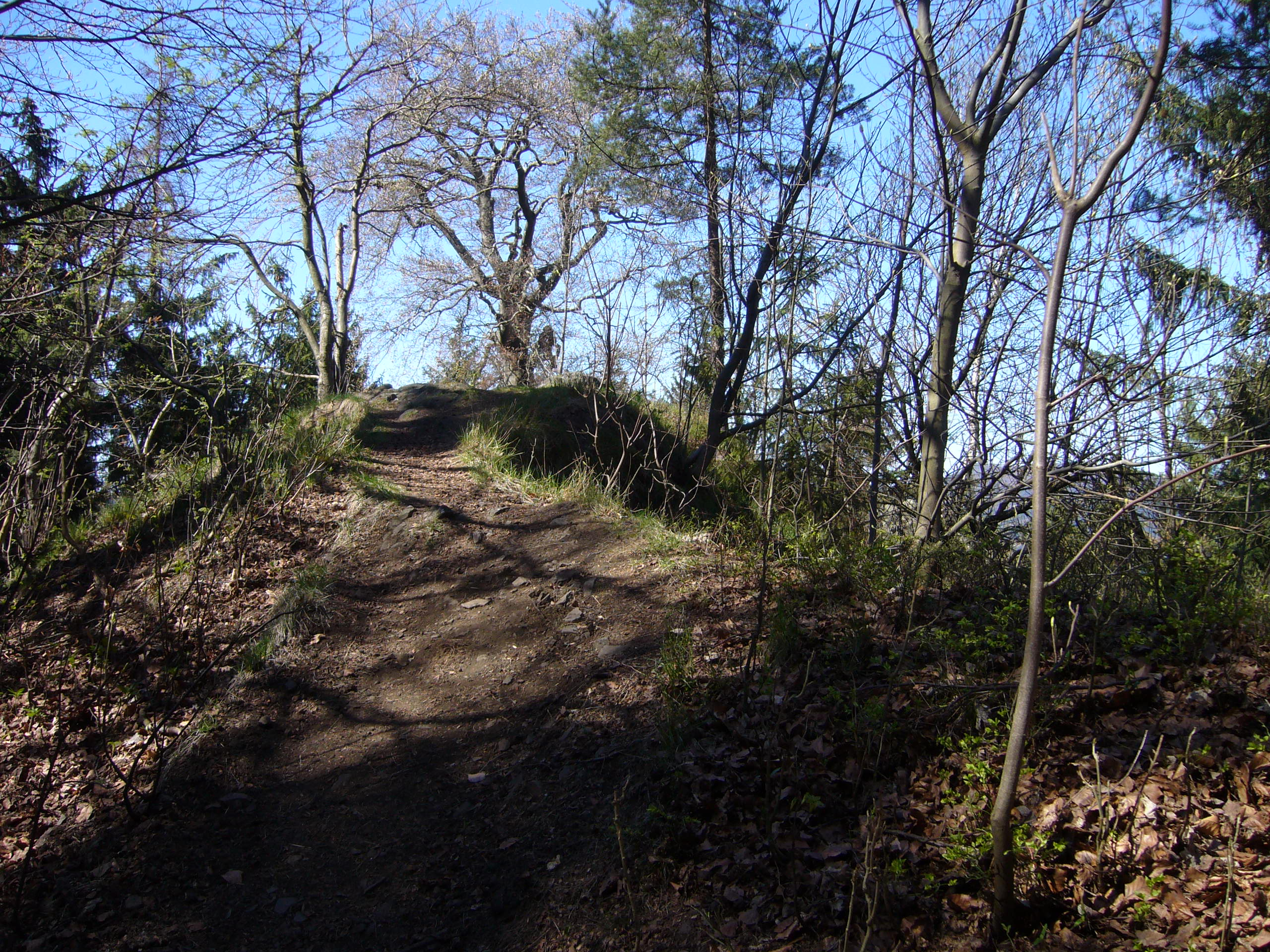 Skála, na které snad stával hrad WInterstein